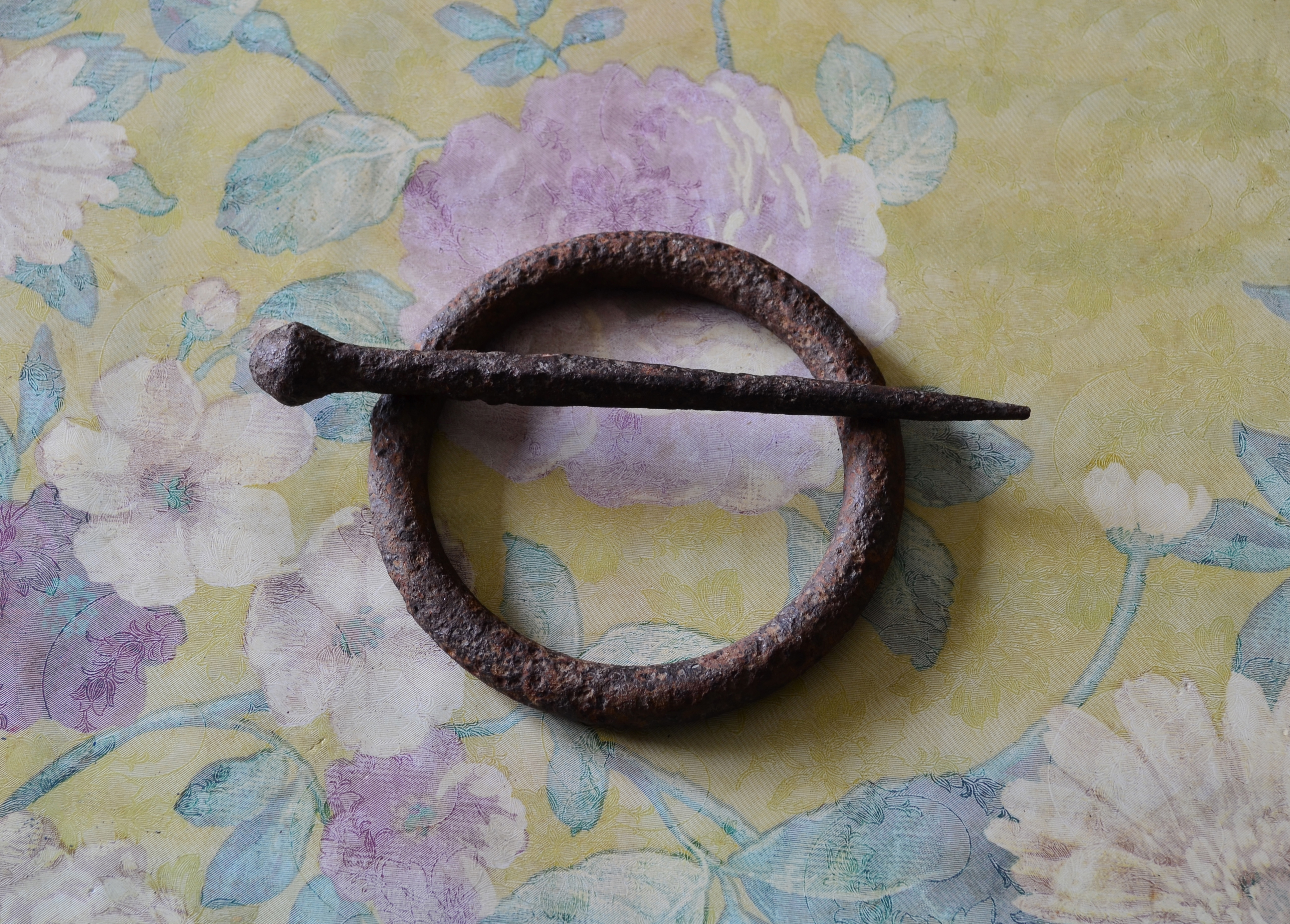 Свайка и кольцо.